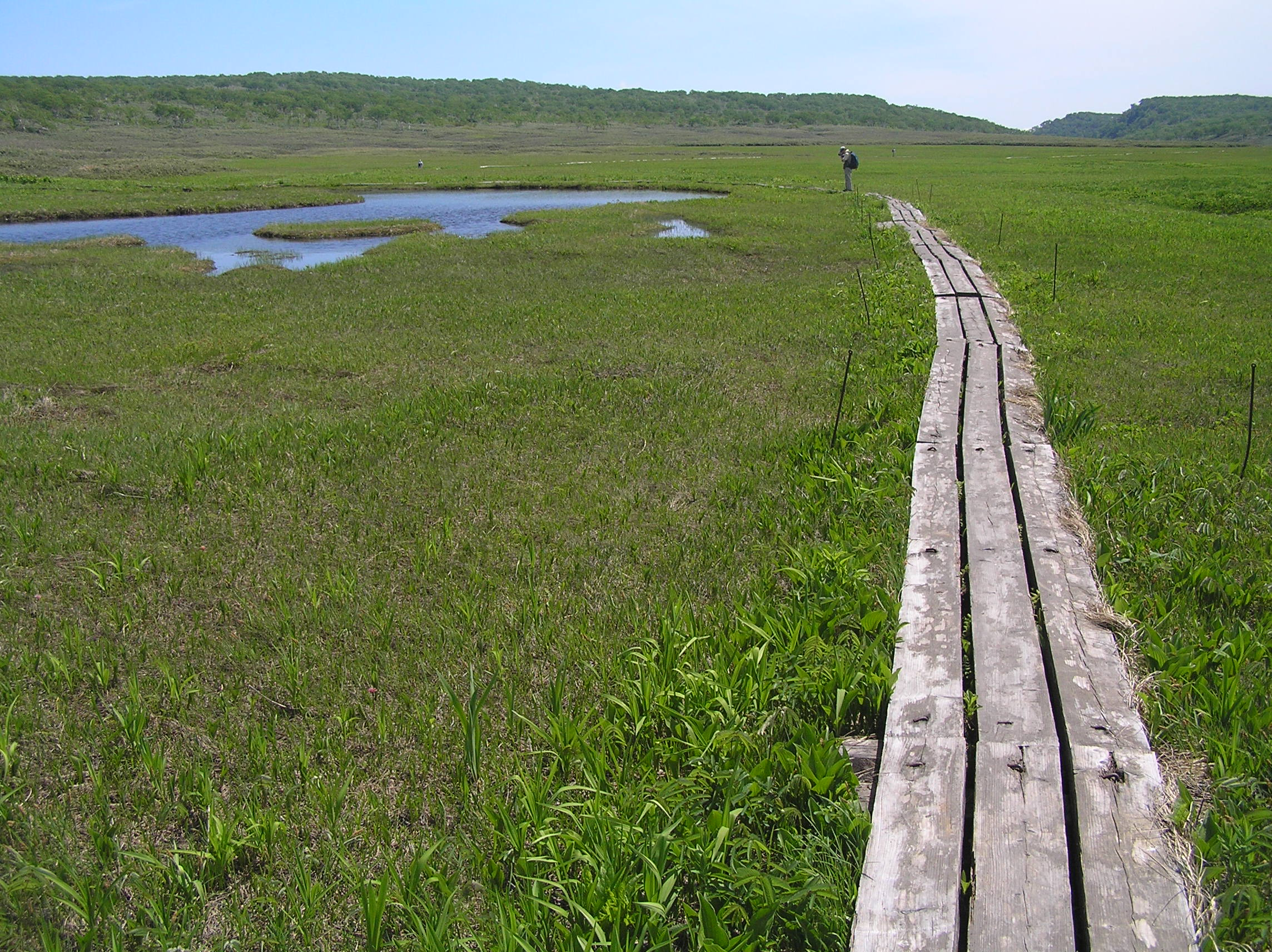 北海道雨竜沼